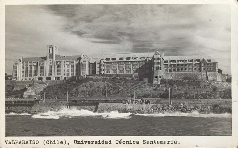 Diferentes postales antiguas sobre Valparaíso.